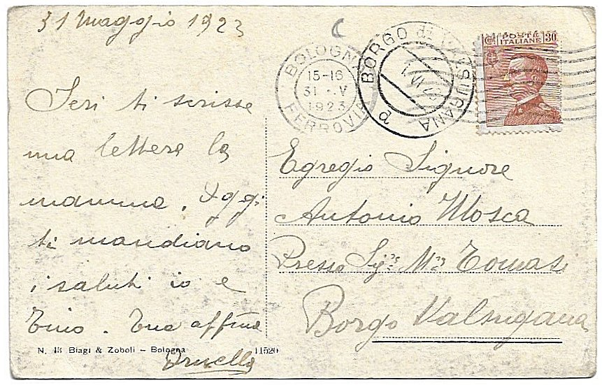 Cancello nel Palazzo Bevilacqua di Bologna - retro della cartolina postale indirizzata a Antonio Mosca presso la maestra Tomasi di Borgo di Valsugana dalla figlia Ornella da Bologna